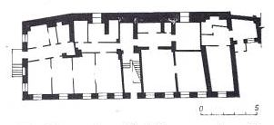 Мінск. Рэвалюцыйная. План 1-га паверха дома № 24б